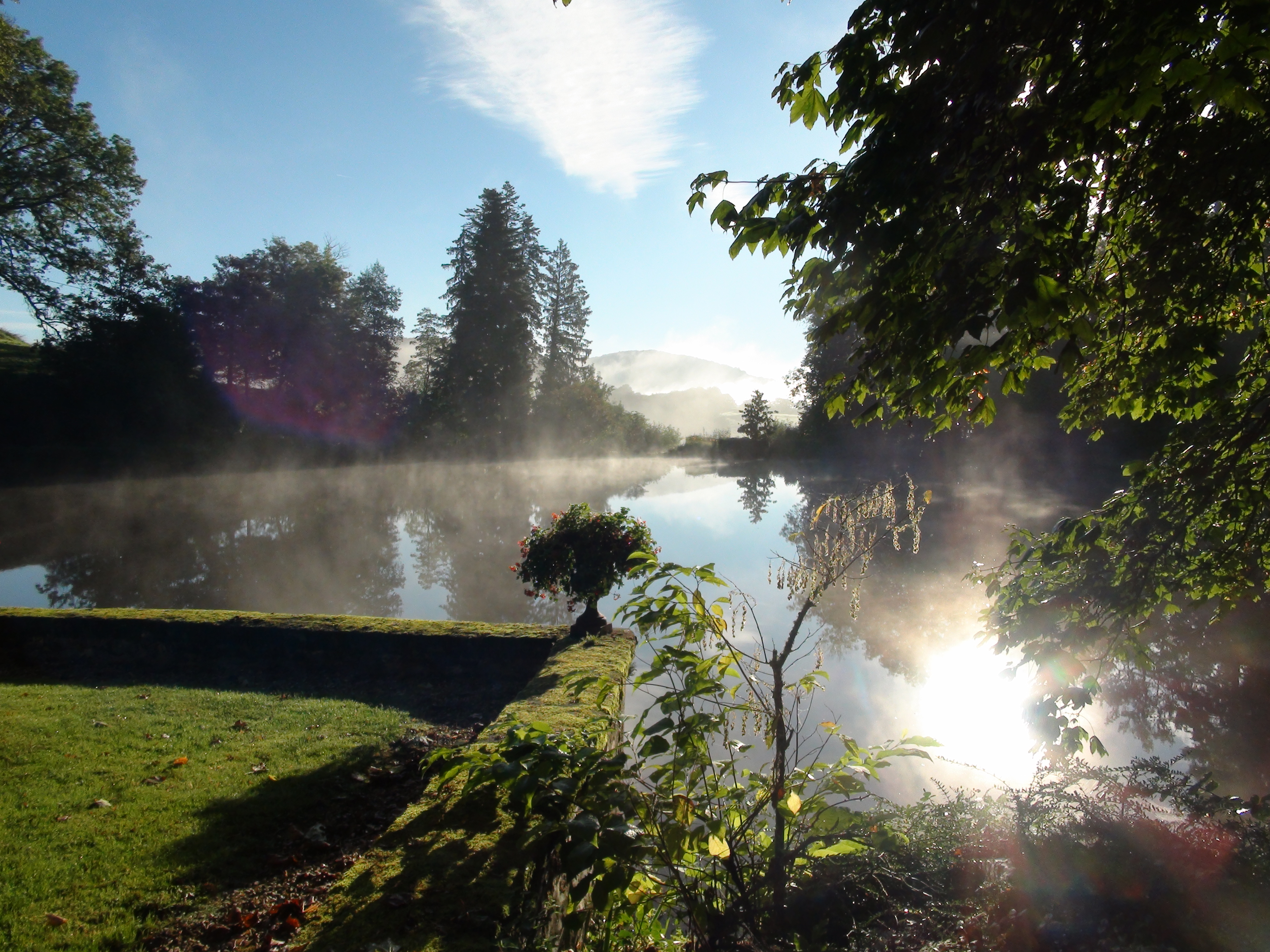 Château de Champlevrier Etang